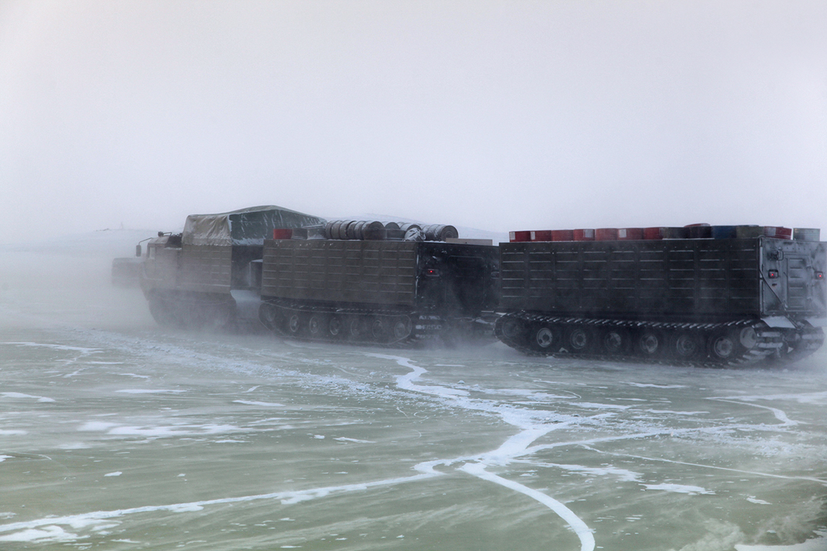 Испытания новых и перспективных образцов вооружения, военной и специальной техники в условиях Арктики